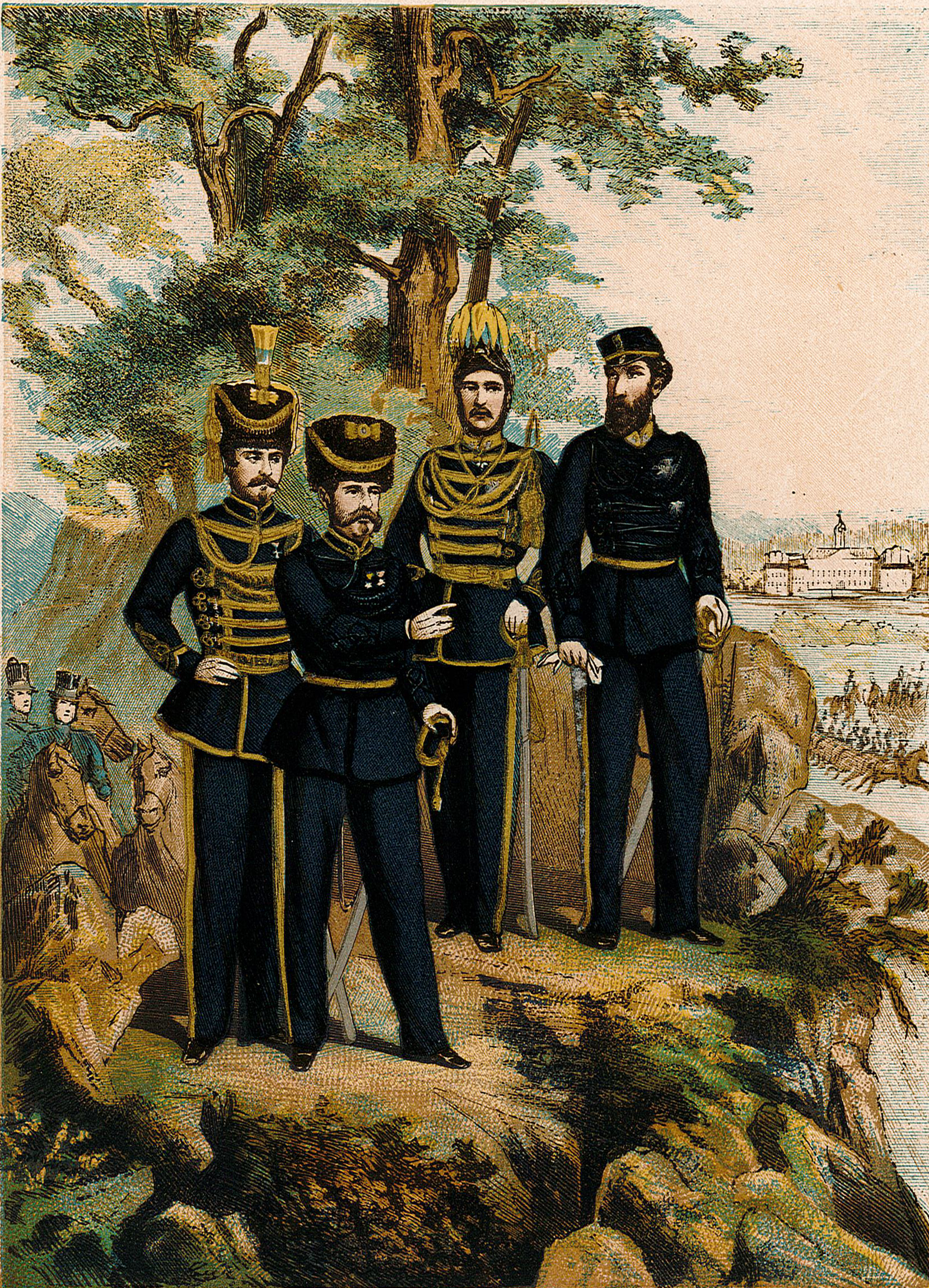 Uniformer för ”H.M. Konung Carl XV:s. Stab.”